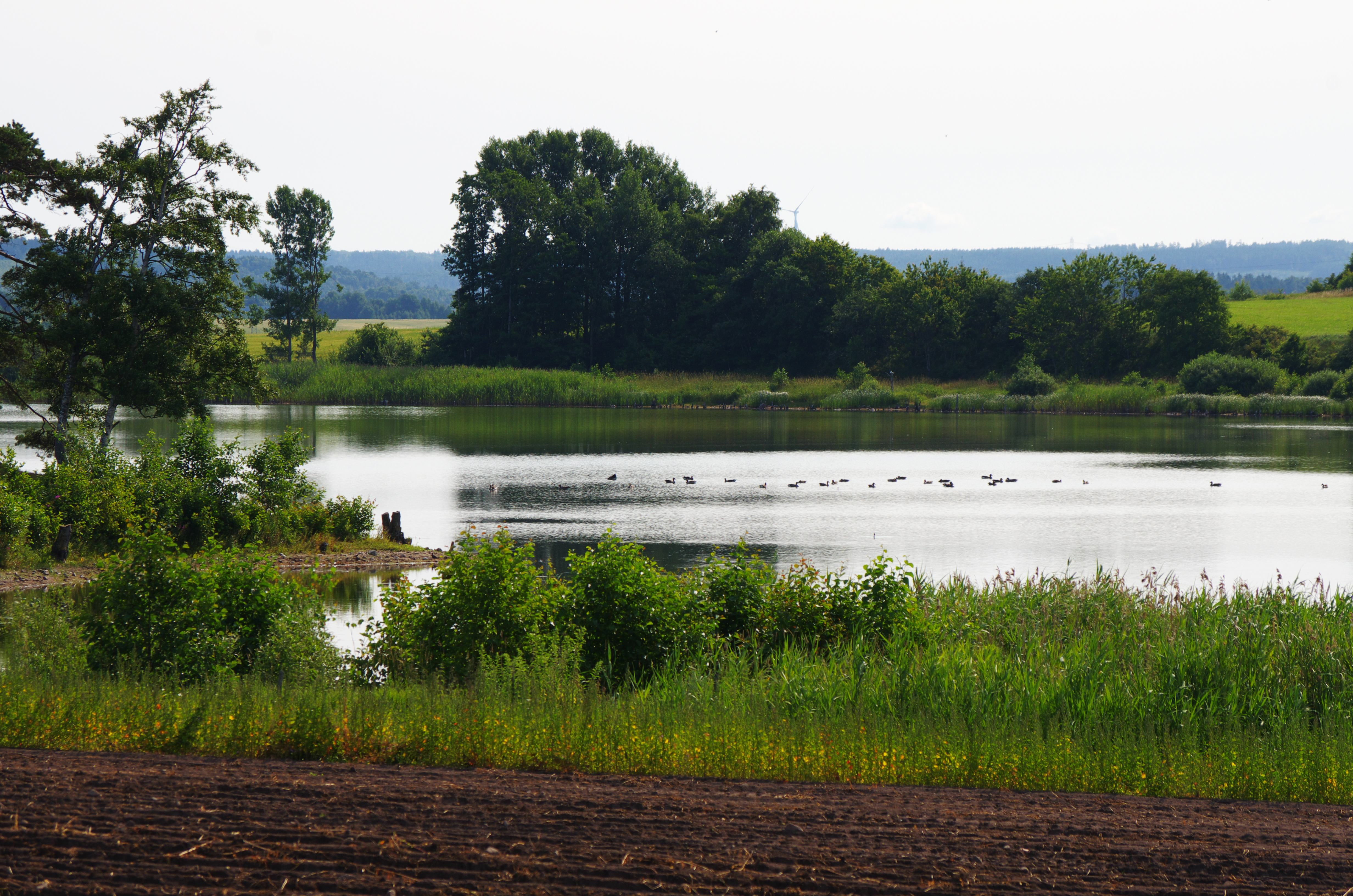 Lilla Tjärby sjö eller Lilla Tjärbysjön är en sjö i Laholms kommun 700 meter norr om tätorten Laholm. Tätorten Lilla Tjärby ligger vid sjöns södra strand.